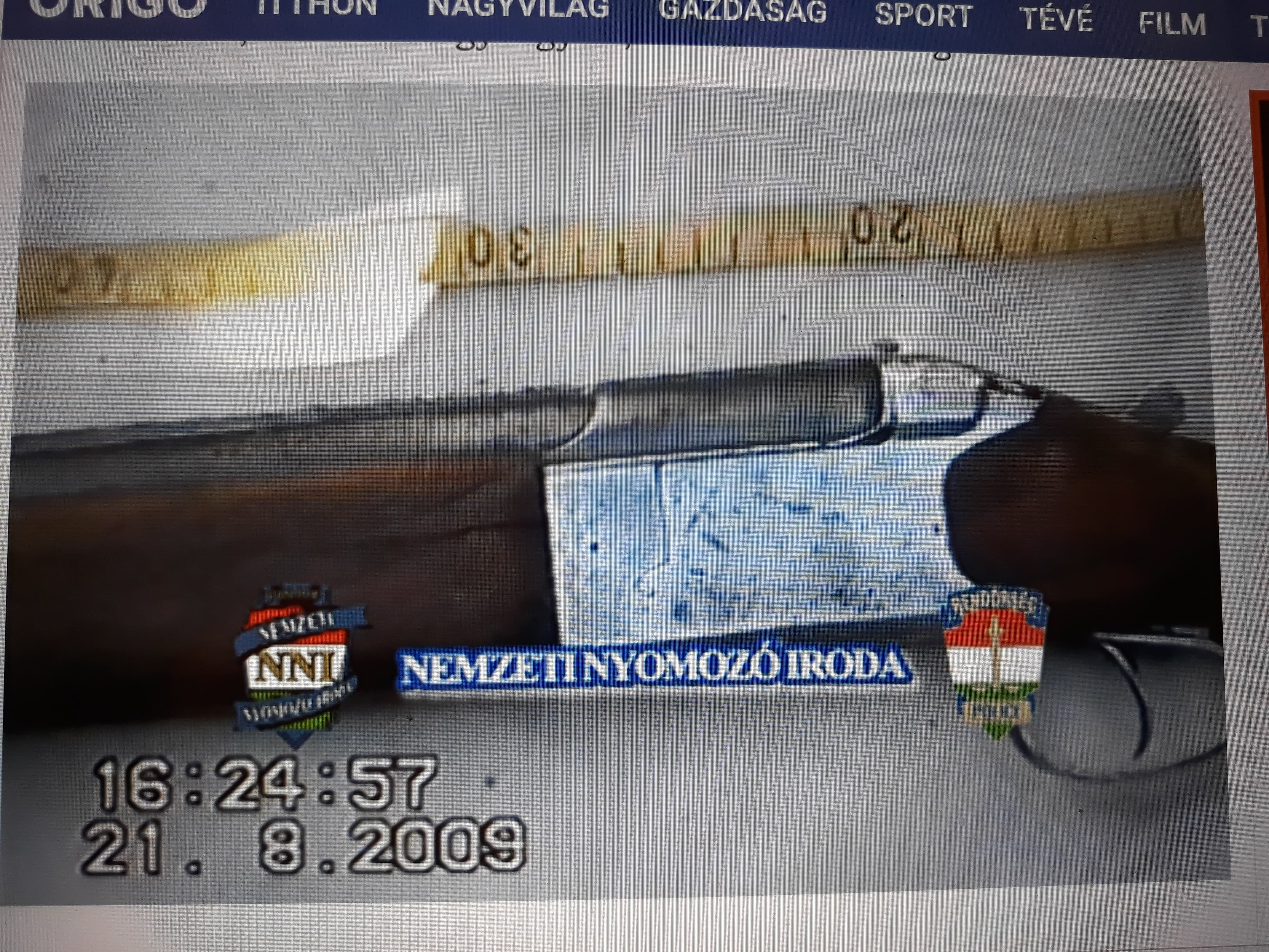 Az ítélet szerint ezzel a fegyverrel okoztak maradandó sérülést Piricsén, valamint ezt a fegyvert használták Tatárszentgyörgyön is, amikor a 27 éves apát és a 4 és fél éves fiát végezték ki